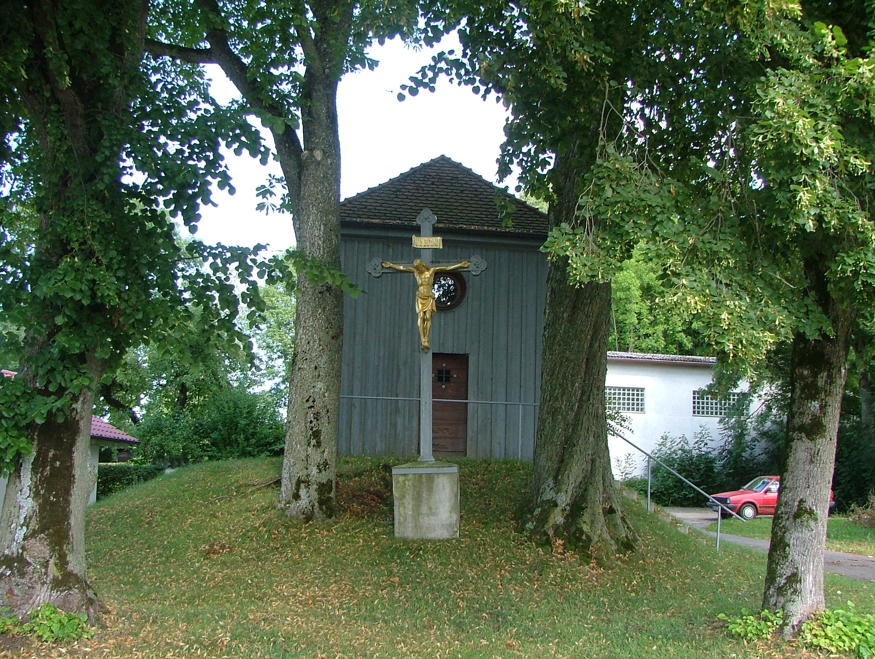 Kapelle